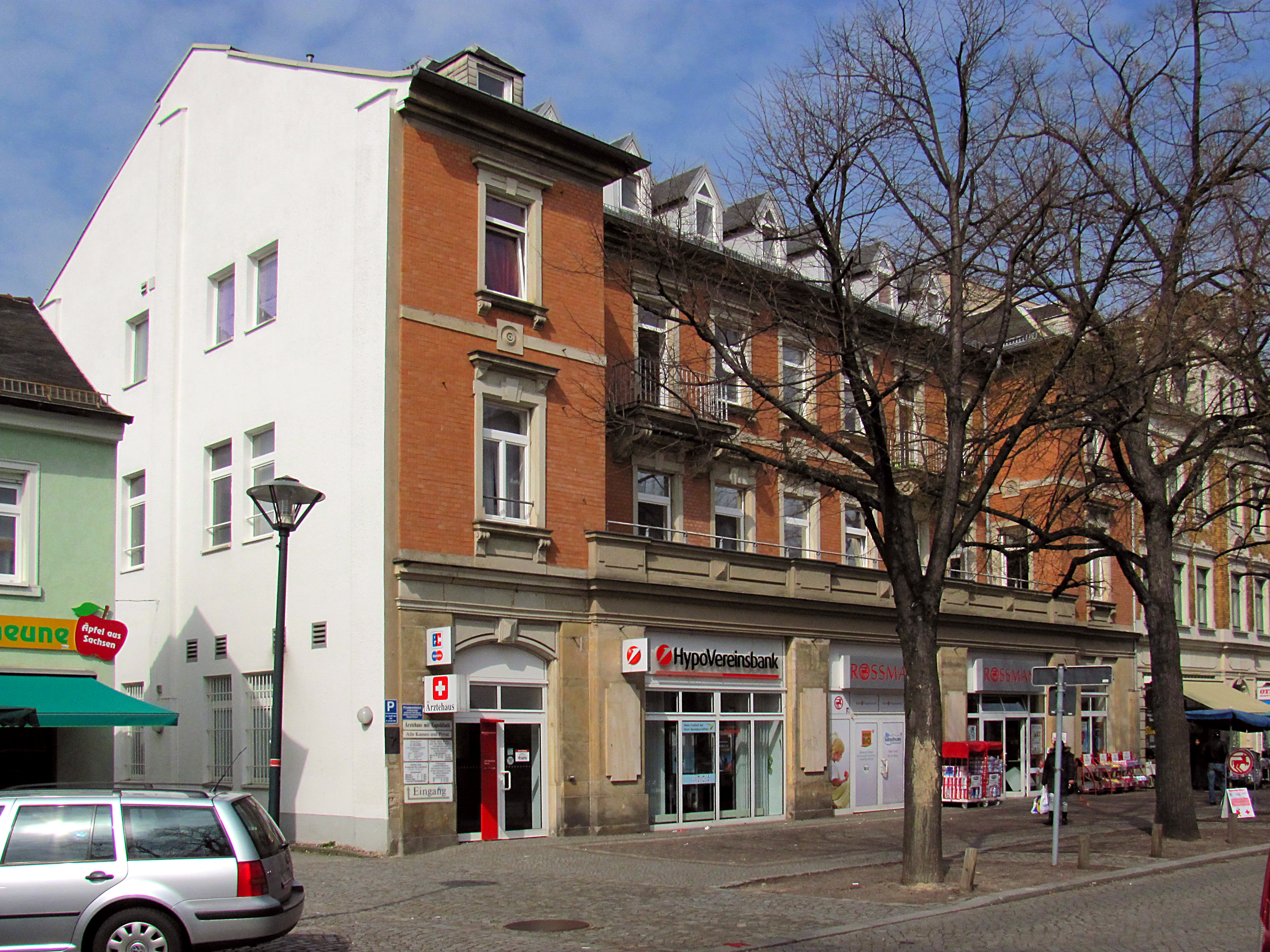 Radebeul, Culmbacher Hof